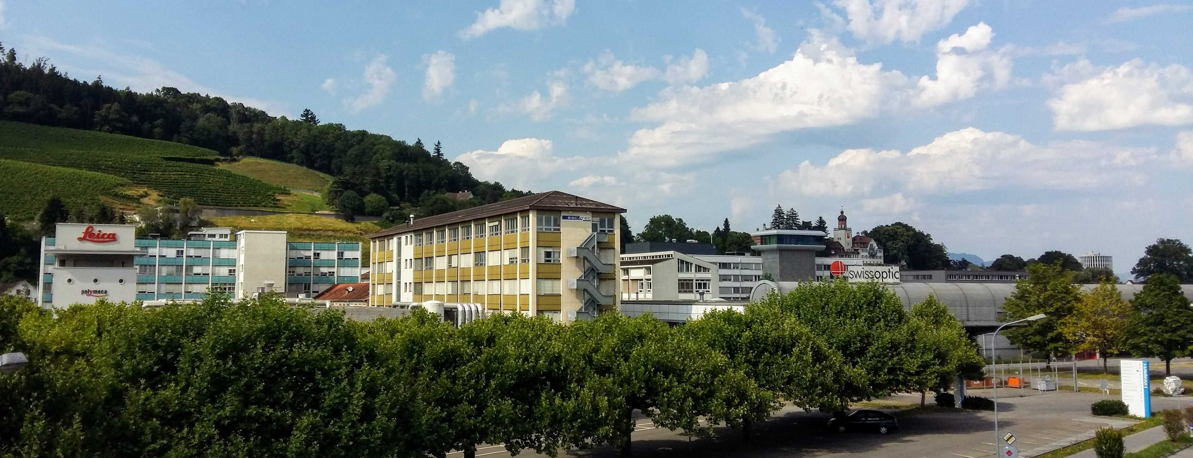 Das Leica Areal in Heerbrugg von Süden her gesen. Hier sind Namhafte Firmen angesiedelt wie: Leica Geosystems, Leica Microsystems, Swissoptic und viele andere